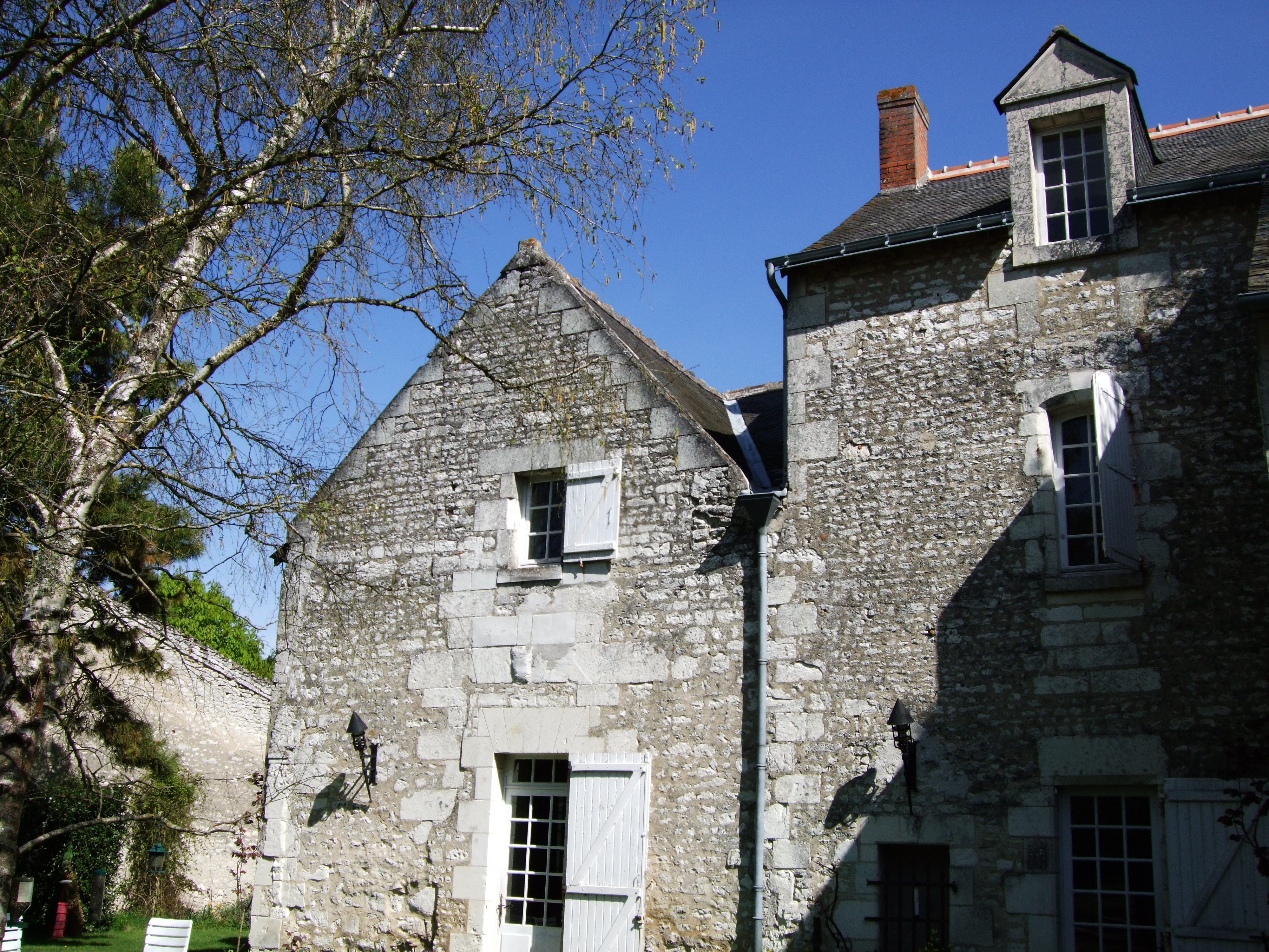 Photo du batiment principal de "La Mabilière"